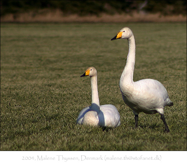 Sangsvaner